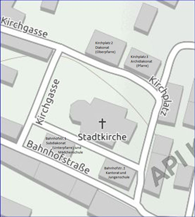 Ruhland, Kirchplatz, Gebäudenutzung vor 1900